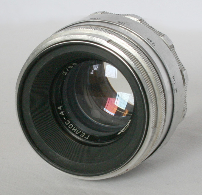 фотообъектив «Гелиос-44» с креплением М39х1